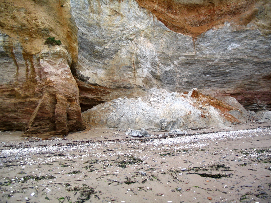 Falaise de Pénestin, Bretagne, F. kaolinisation des dépôts fluviatiles dans la partie sud de la falaise. Le kaolin apparaît en blanc sur la photo